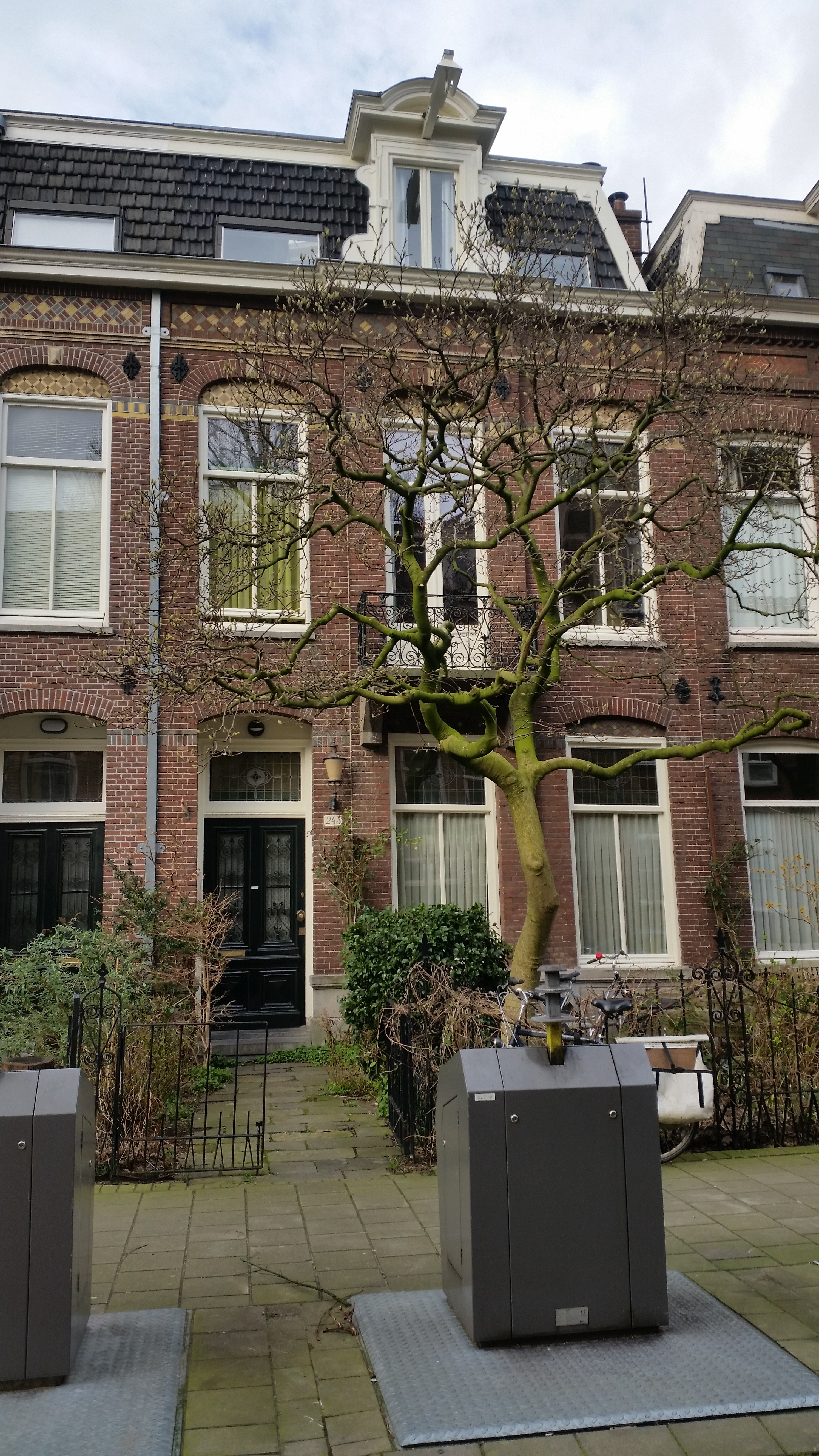 Tweede Oosterparkstraat 245, Amsterdam. Woning waar Klaartje de Zwarte-Walvisch in de Tweede Wereldoorlog werd opgehaald